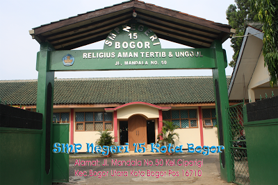 Jalan Raya Mandala No.50 Ciparigi Bogor Utara 16157